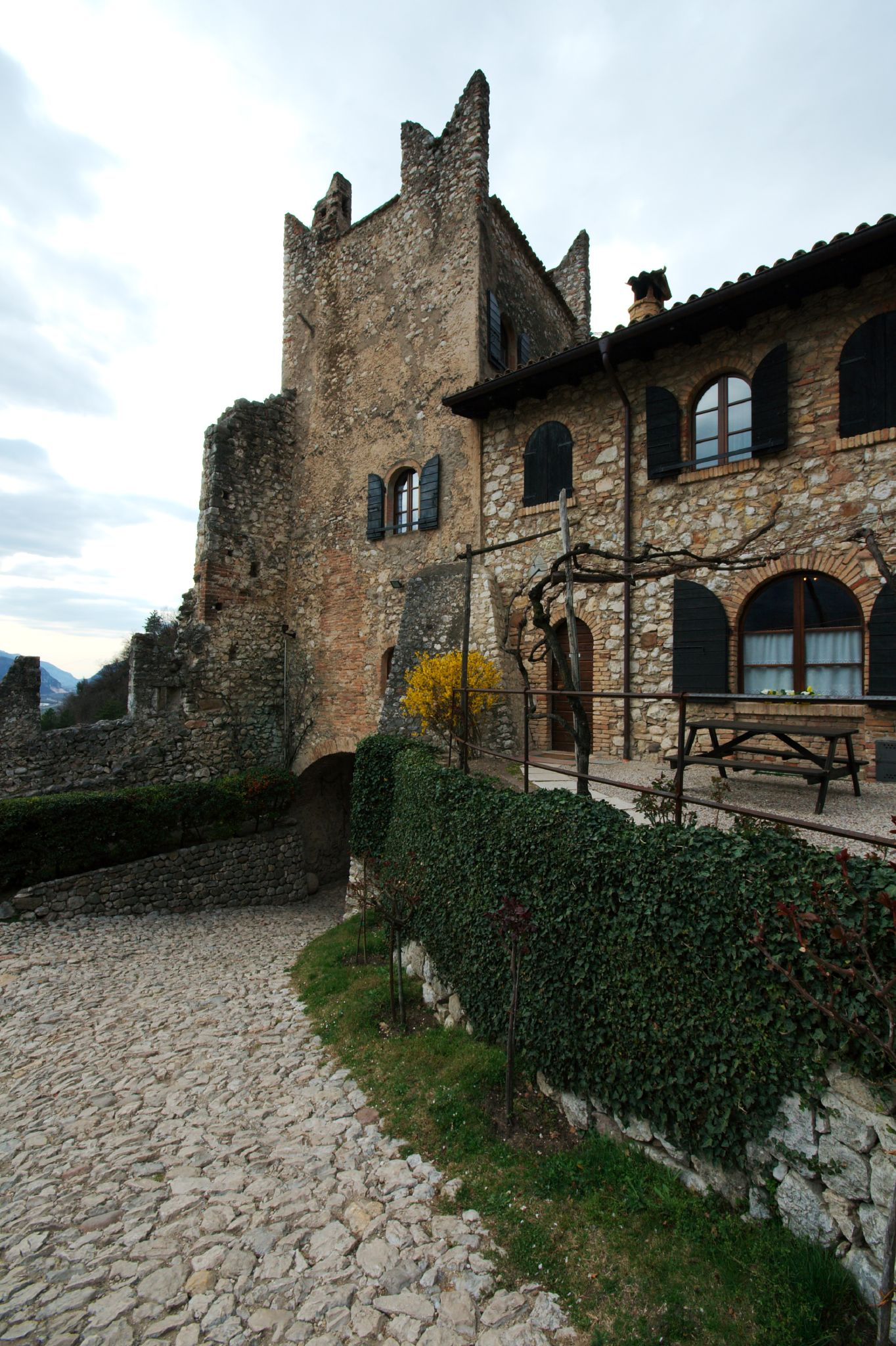 Il castello di avio. Avio, Trentino-Alto Adige. – La torre a tre lati da cui attualmente si accede all'interno delle mura.